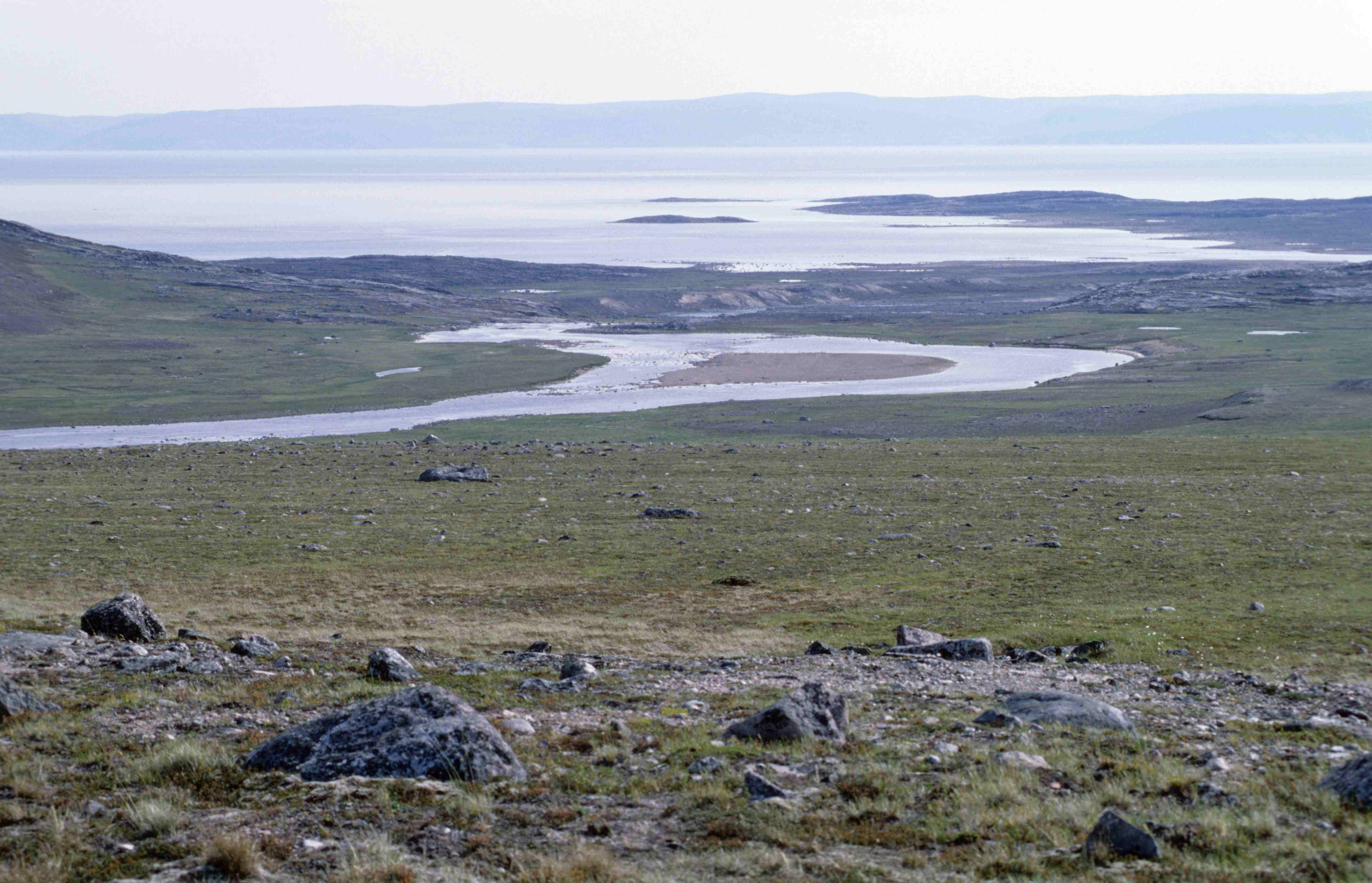 Sila River and Wager Bay (Ukkusiksalik National Park, Nunavut, Canada)